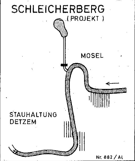 Grafik für das Projekt Pumpspeicherkraftwerk Schleicherberg, Mehring/Mosel, Deutschland, 1960er/1970er Jahre